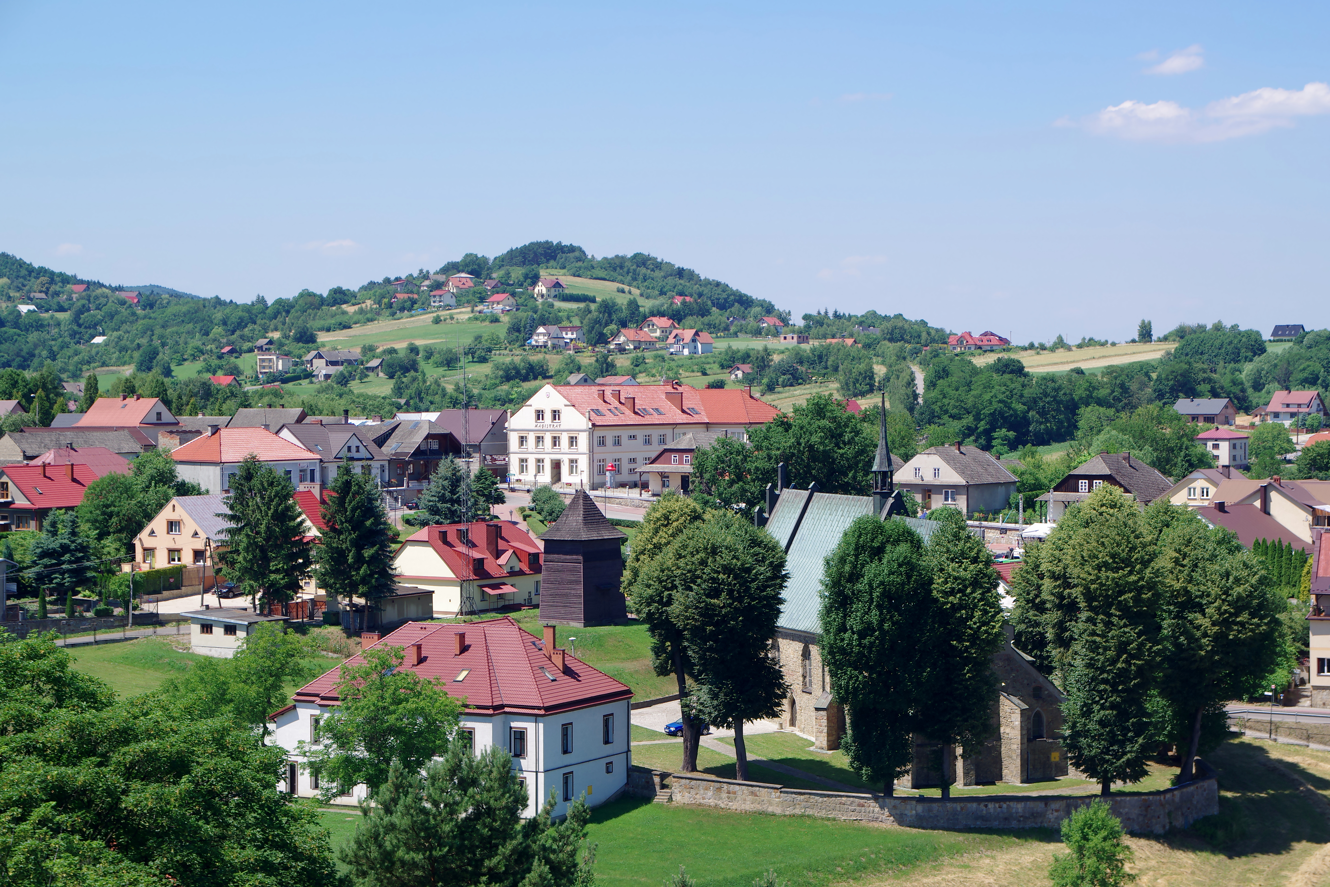 Widok na centrum Czchowa z czchowskiej baszty